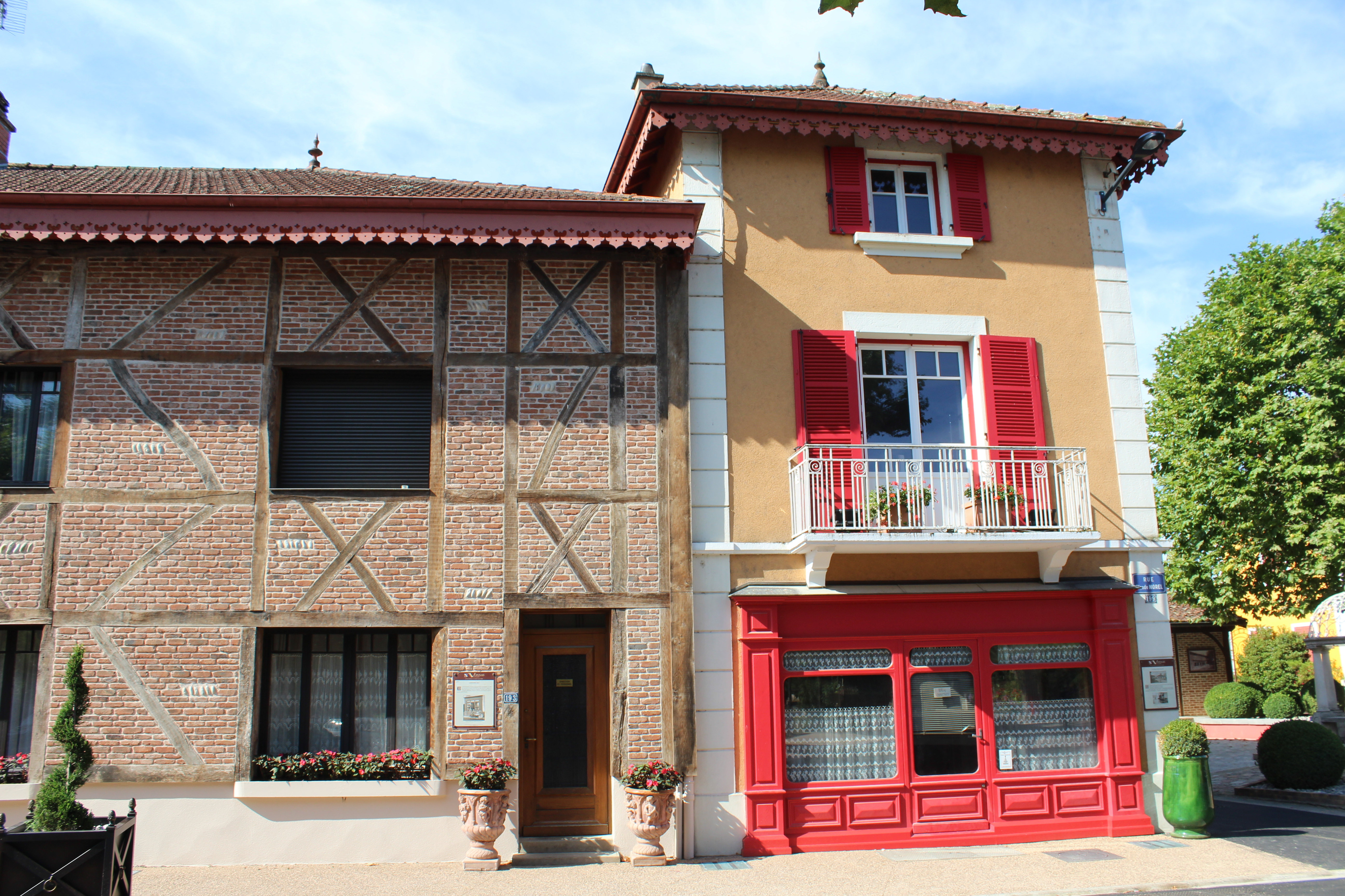 Villa Élisa Blanc à Vonnas en face de la maison Blanc.